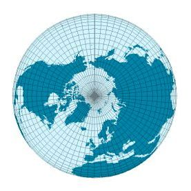 Azimutalprojektion mit normaler Lage